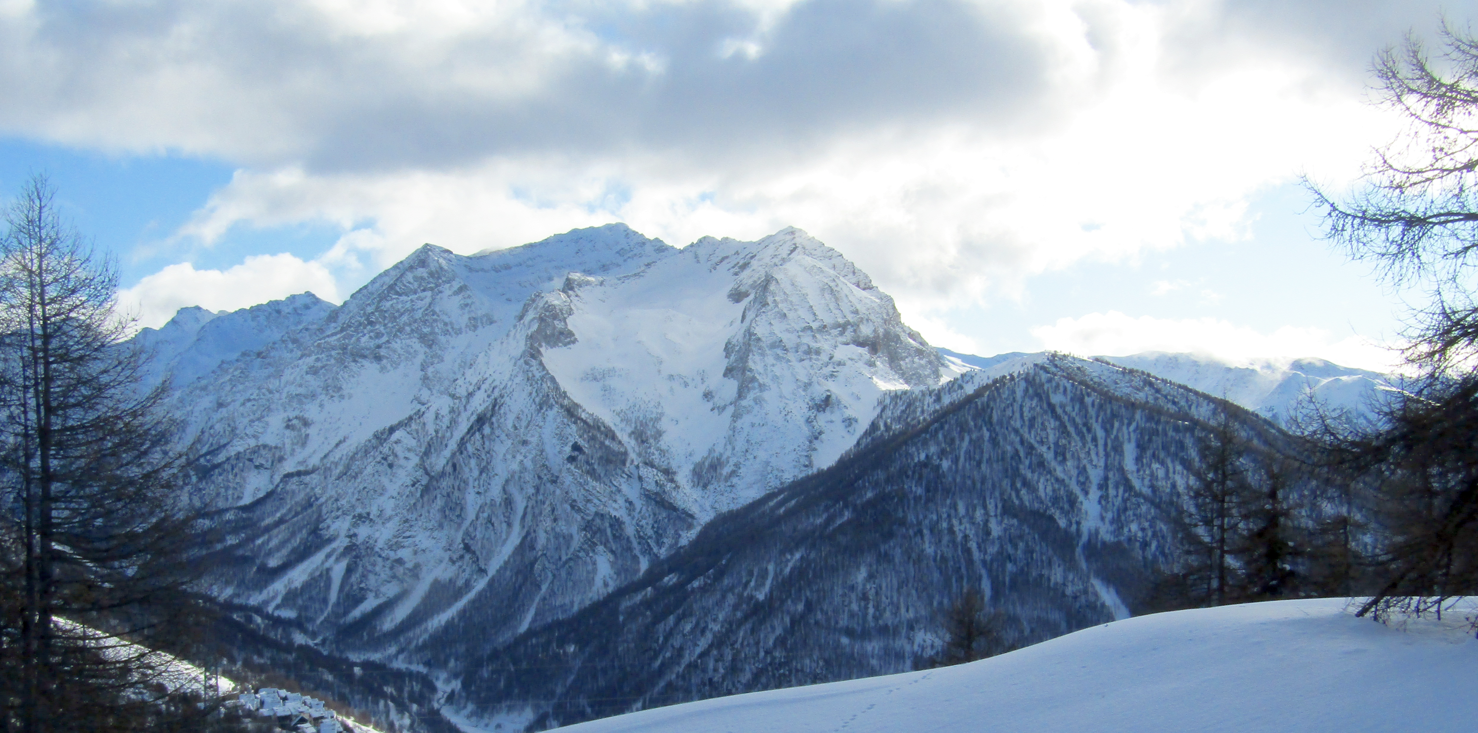 Roc del Boucher visto dalla pista di fondo delle Marmotte (Sestriere), a destra la Cima del Bosco